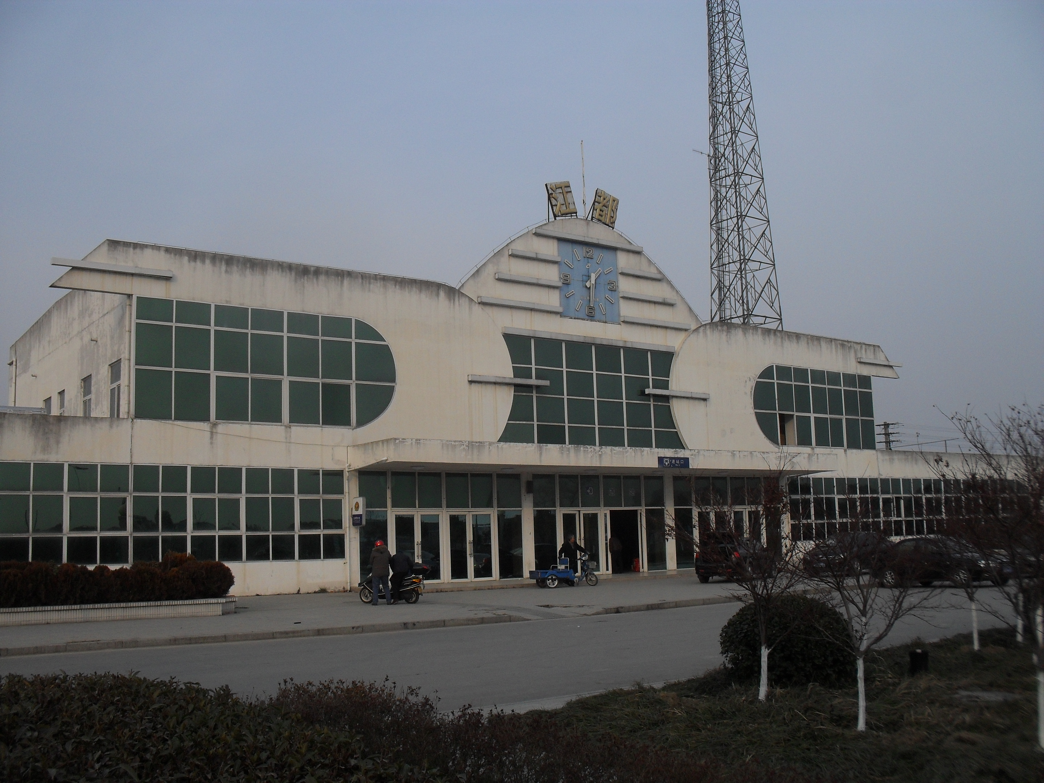 江都火车站